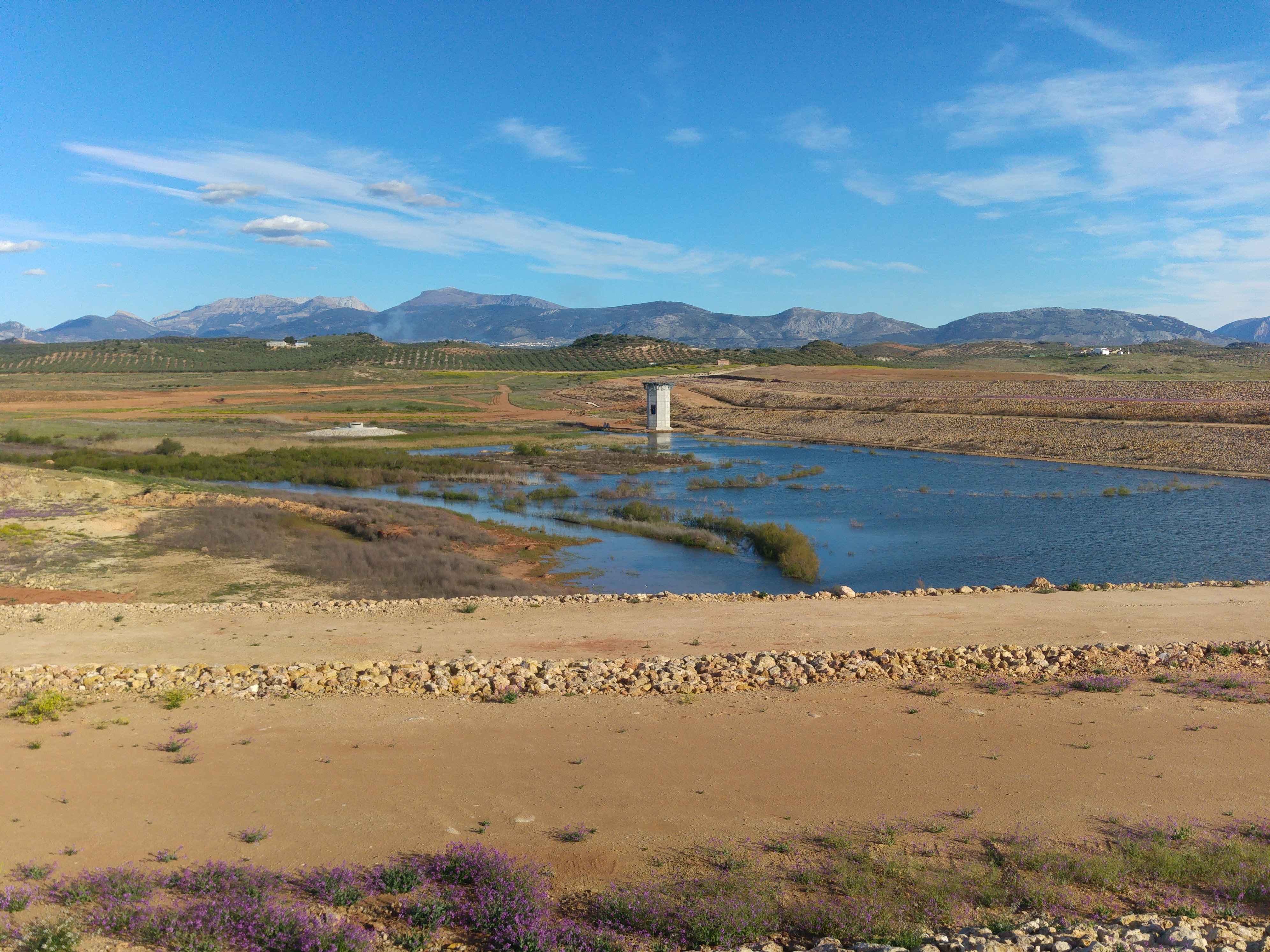 Balsa del Cadimo a más del 80̤ por ciento de ejecución.